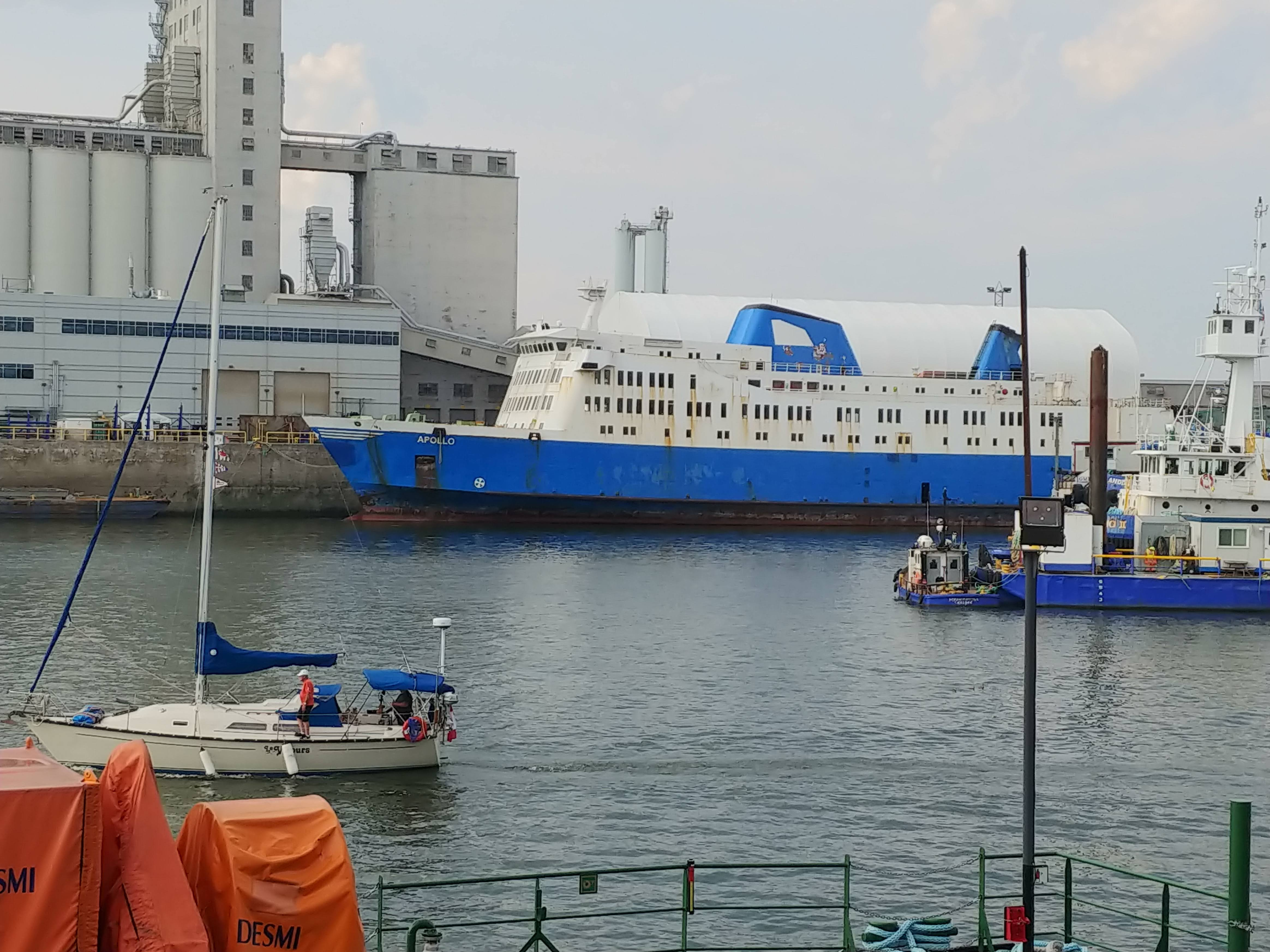 Traversier Apollo près des moulins de la Bunge